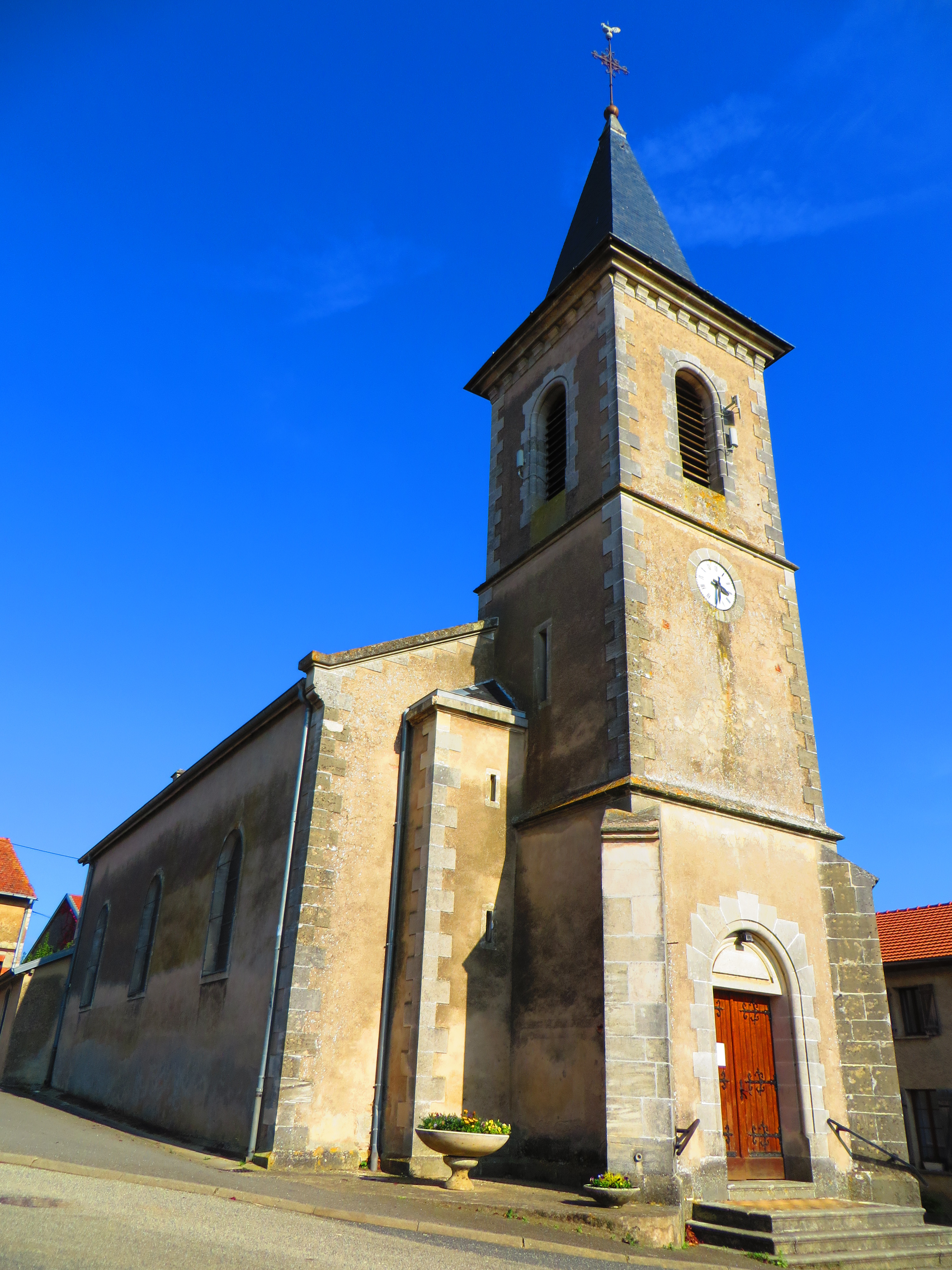 Grémecey l'église Saint-Vit